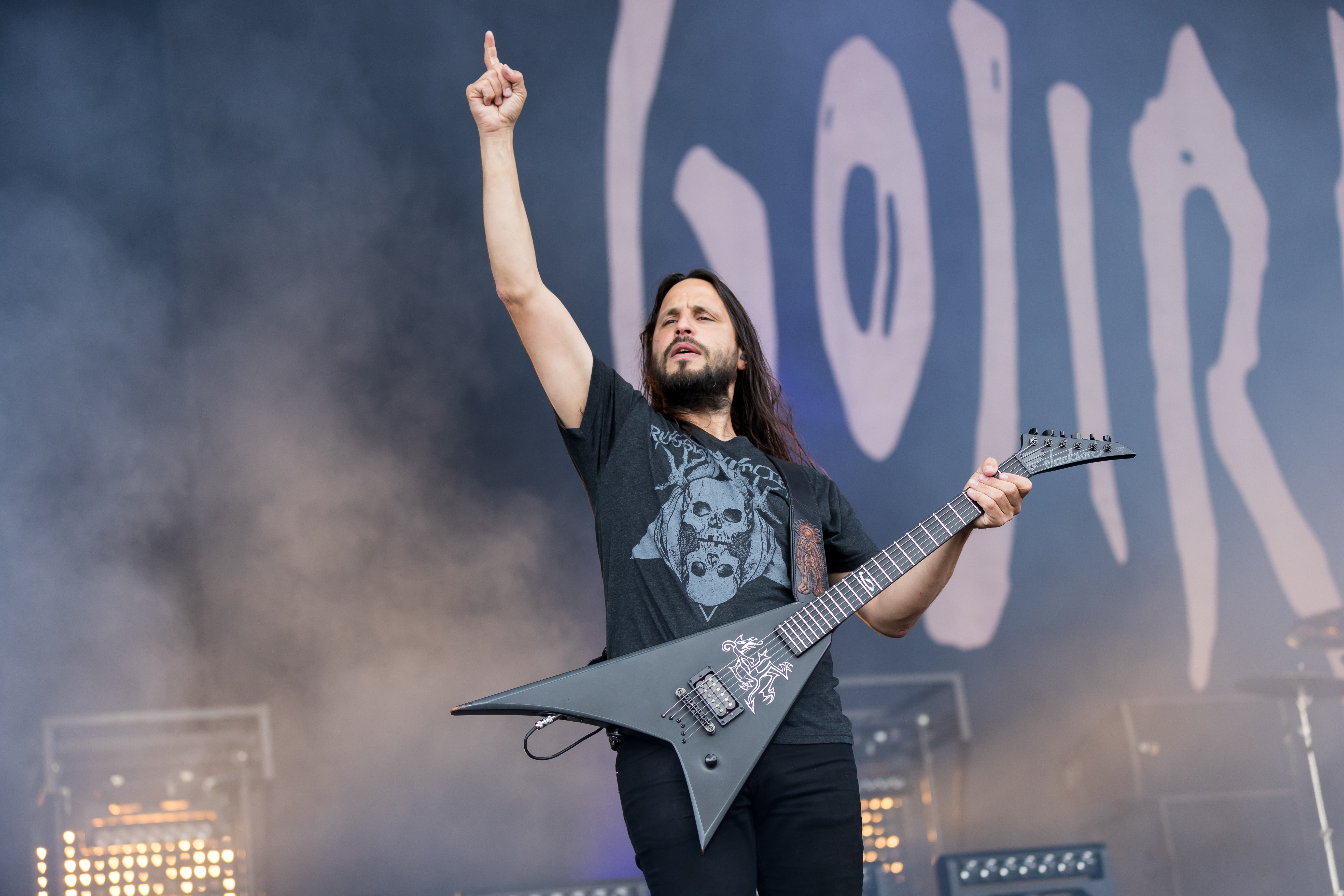 Gojira during Rock am Ring at Nürburgring, Nürburg, Rheinland Pfalz, Germany on 2017-06-04, Photo: Sven Mandel